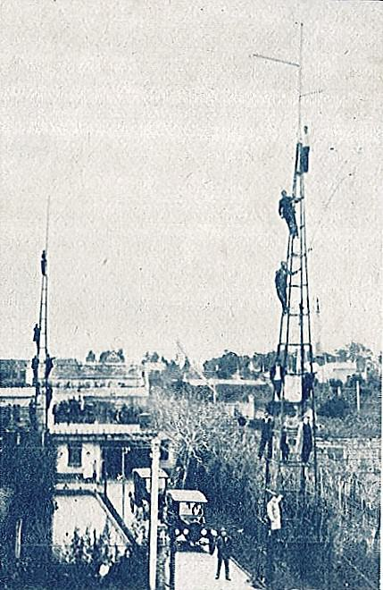 Primer Antena de la Estación Monte Carlo.